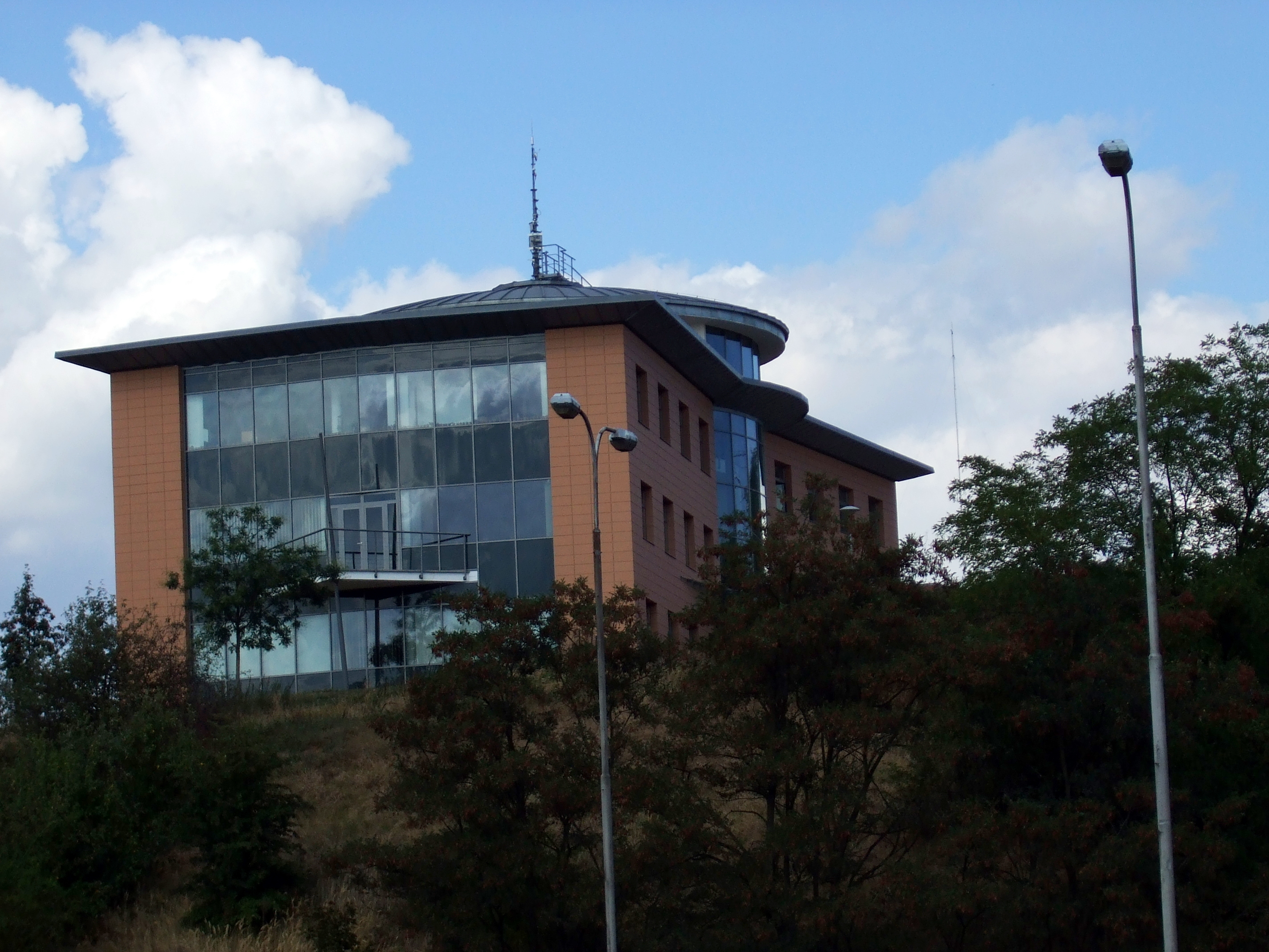 budova Českého hydrometeorologického ústavu v Plzni-Lochotíně